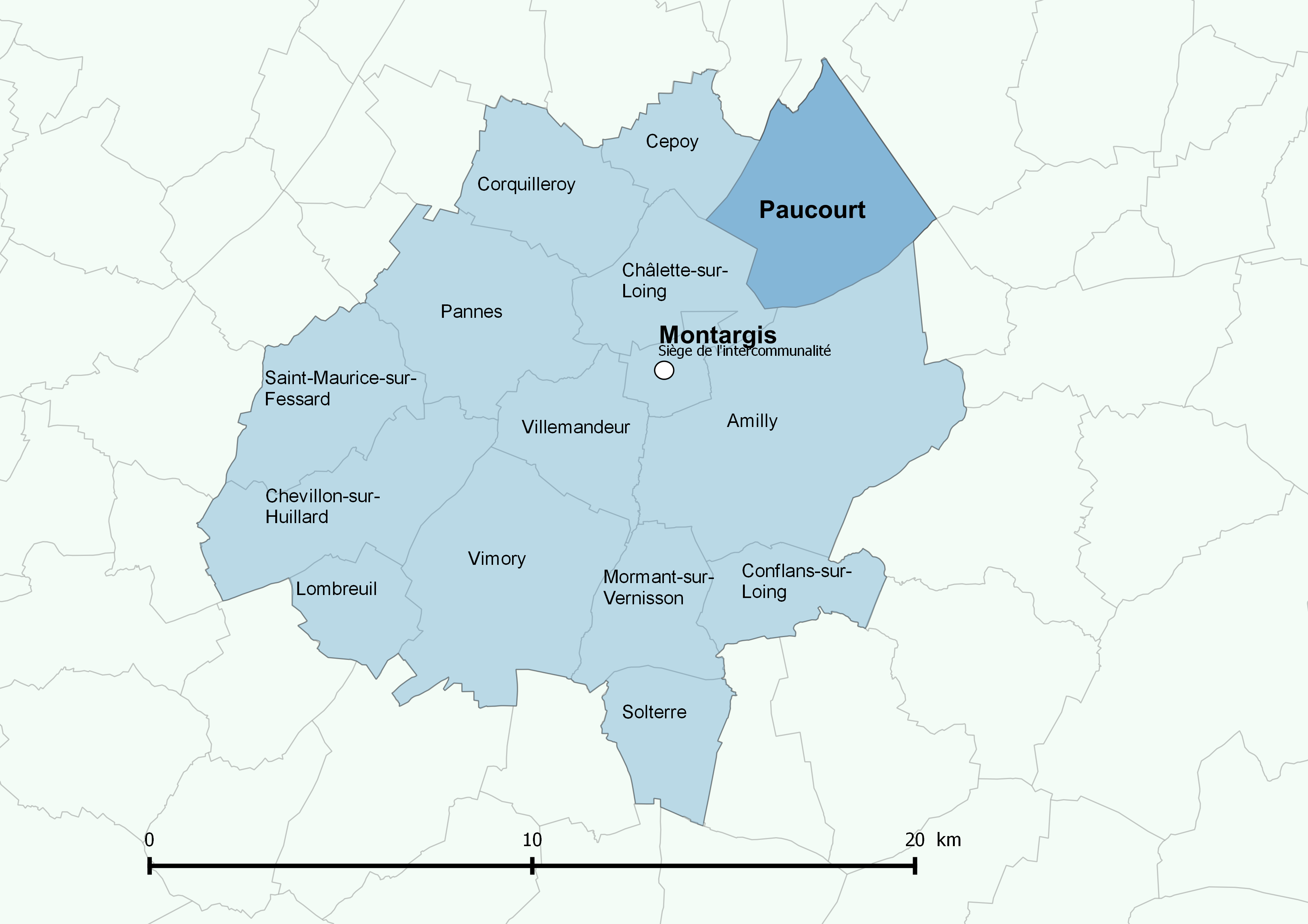 Périmètre de l'Agglomération montargoise et rives du Loing - Positionnement de la commune de Paucourt